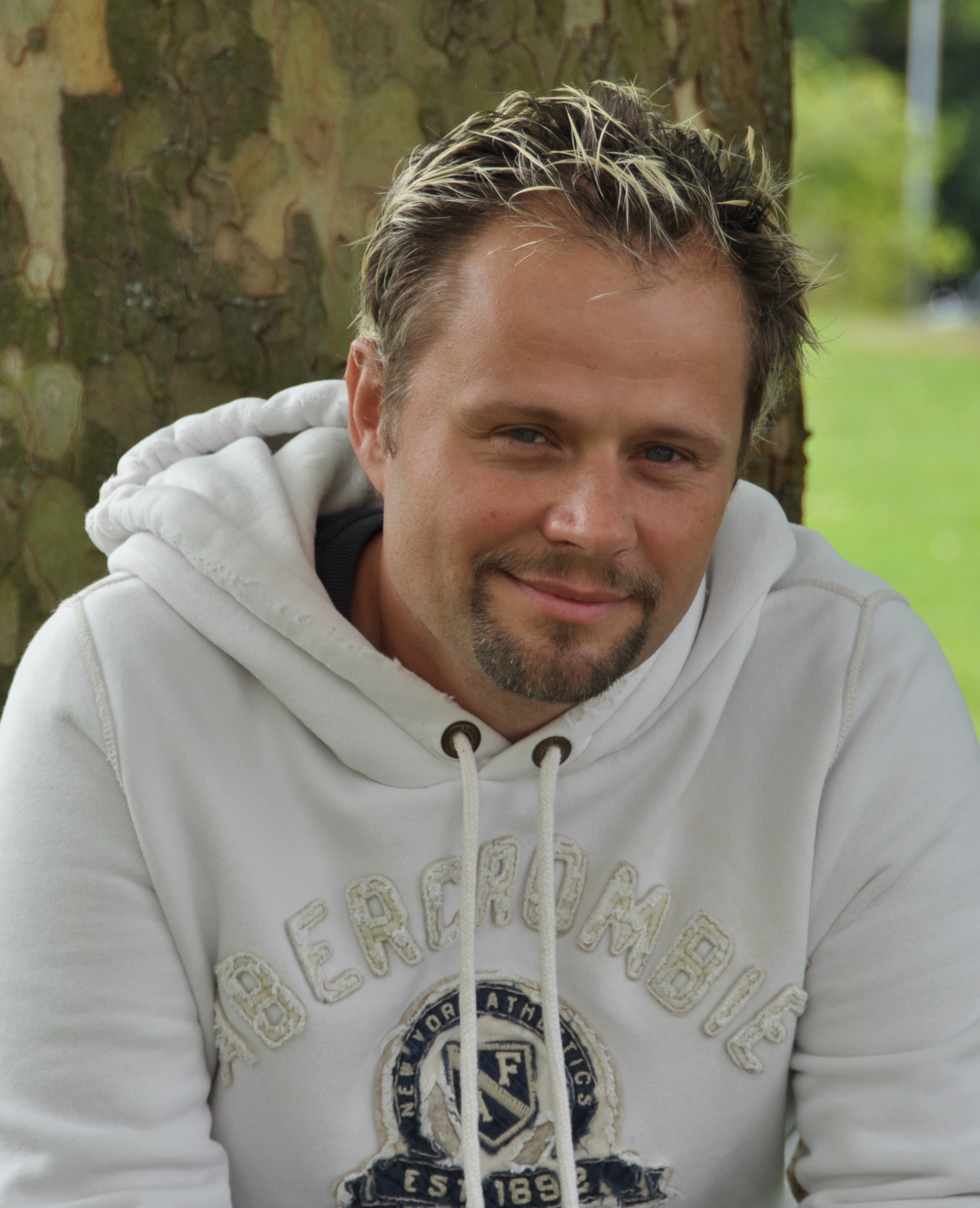 Der christliche Musiker Arne Kopfermann bei einem Interview mit dem Christlichen Medienmagazin pro am 5. August 2010 in Wetzlar